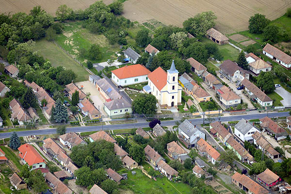 Sármellék